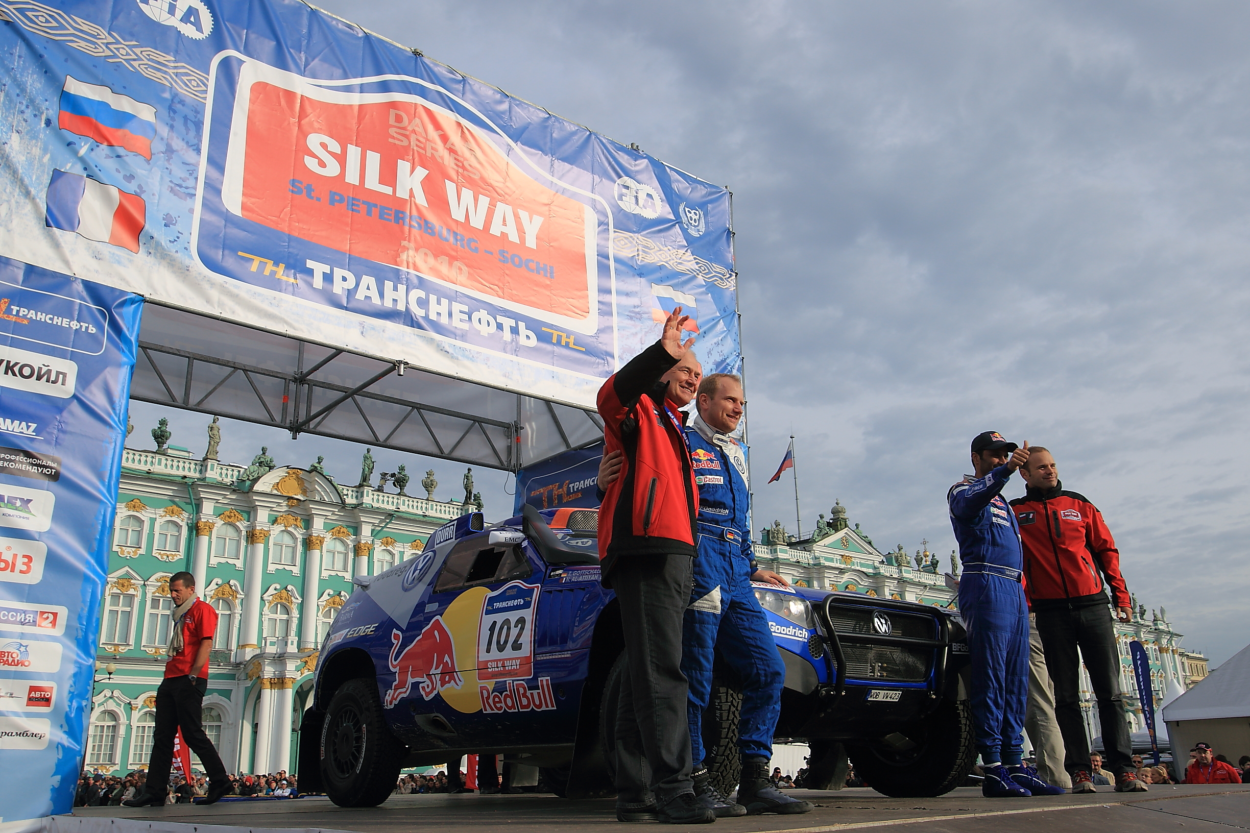 Торжественный старт ралли-марафона "Шелковый путь 2010" был дан с Дворцовой площади в Санкт-Петербурге 11 сентября 2010